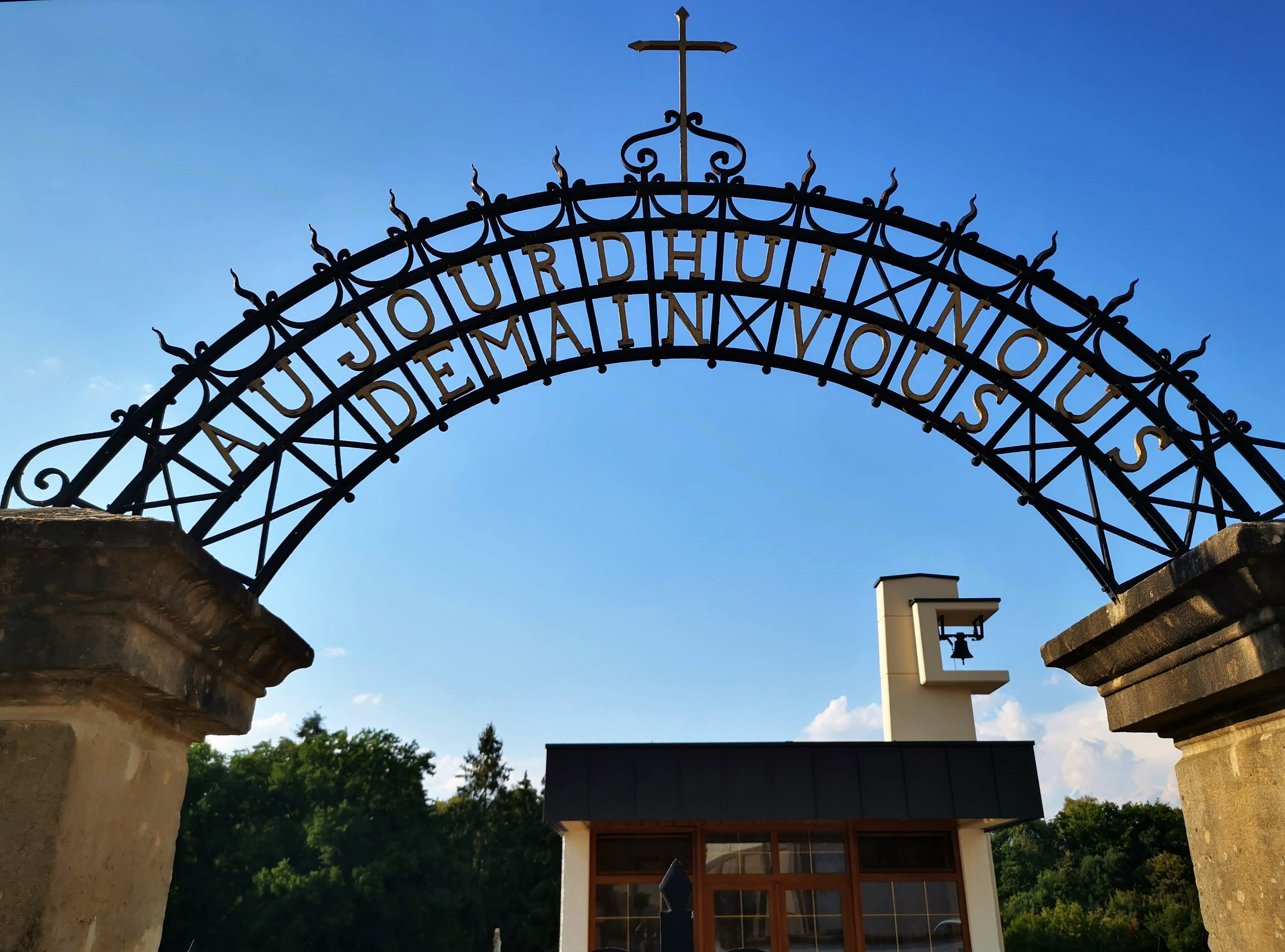 Consdorf. Portail d'entrée du cimetière.